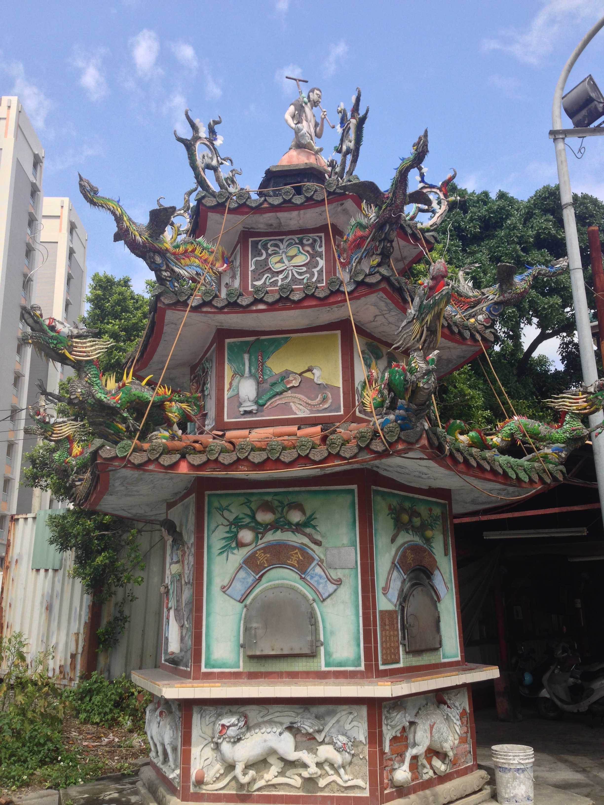 中文（台灣）: 洲美屈原宮金爐